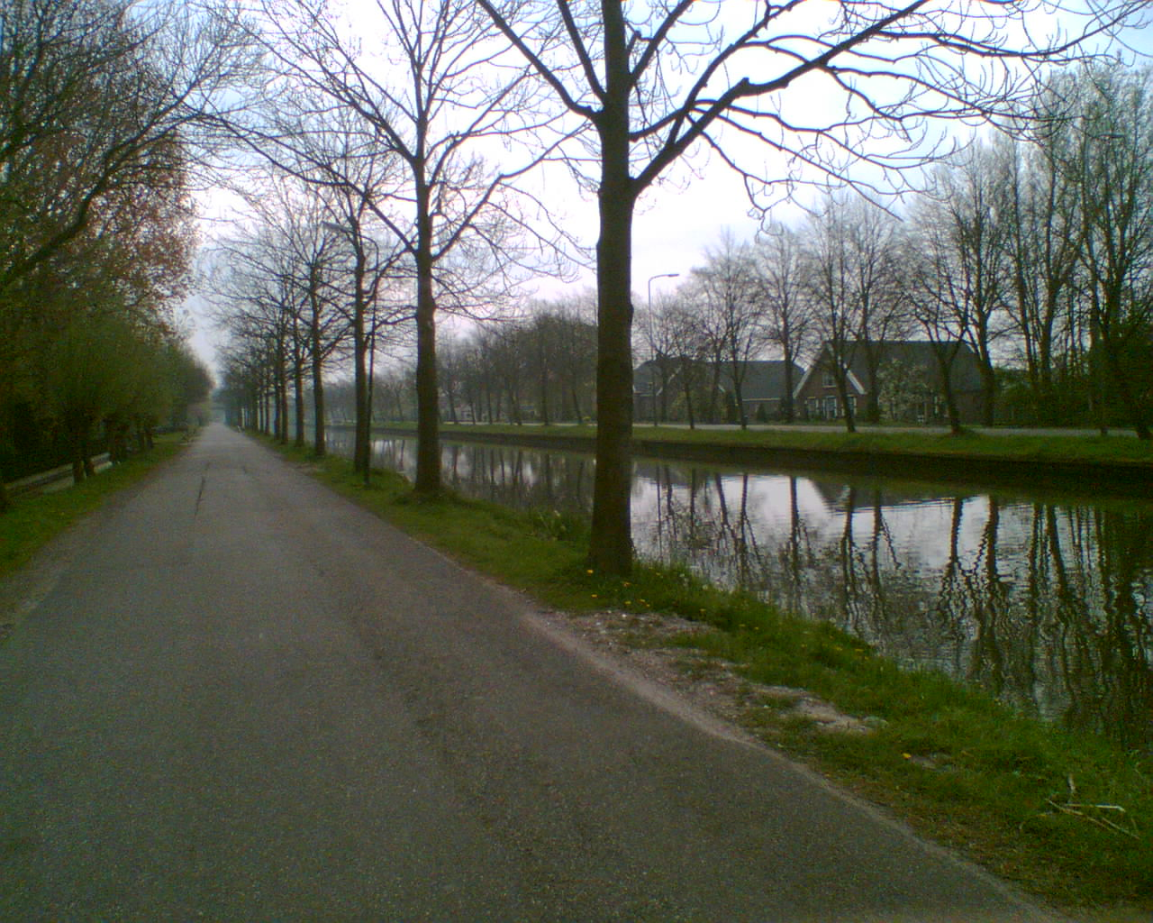 Leidse Rijn, the Netherlands, between Harmelen and De Meern